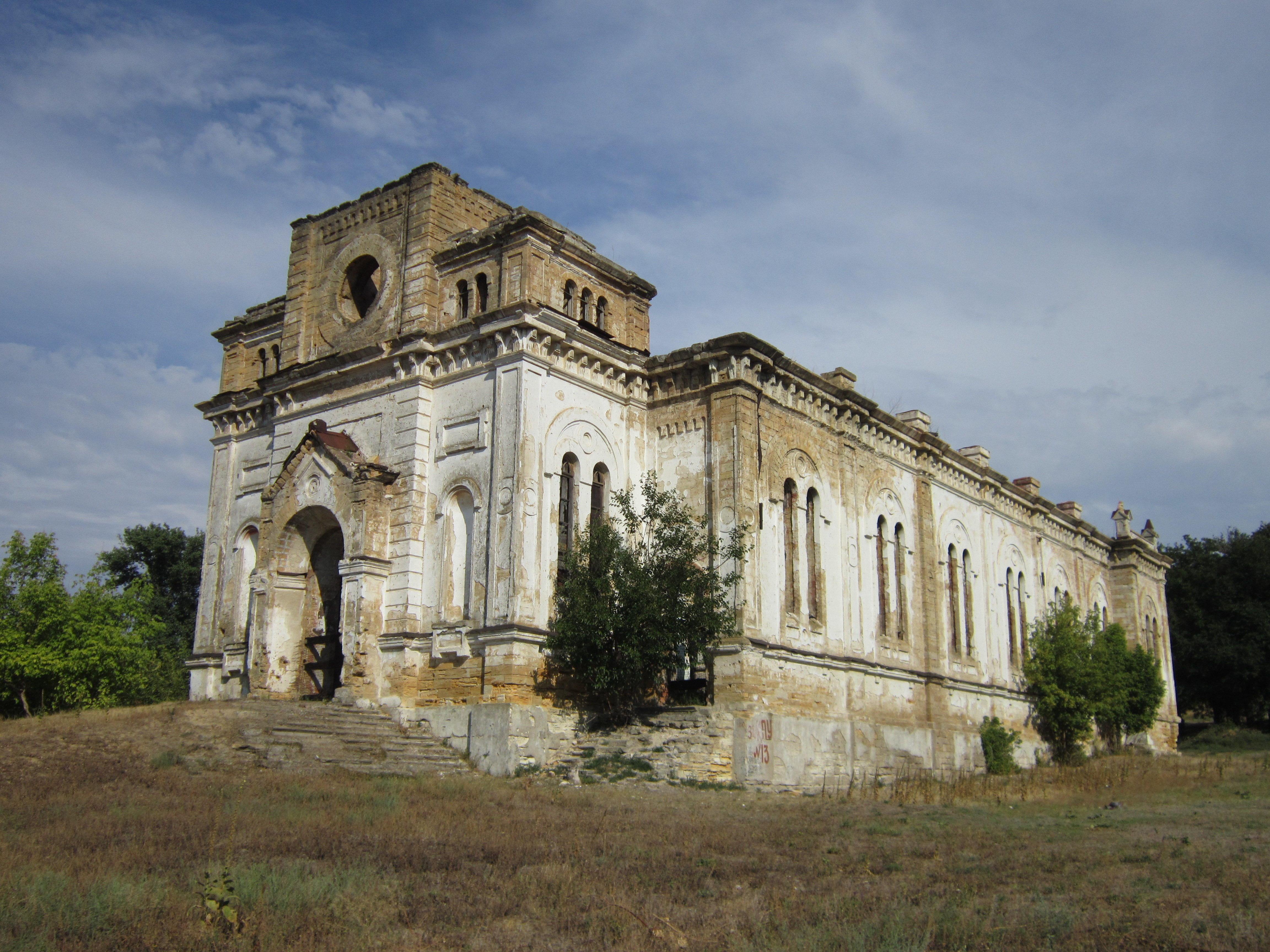 Кірха, смт. Лиманське, Роздільнянський район (смт. Лиманське виникло на місці німецьких колоній Зельц та Кандель), 1892 рік.